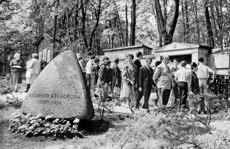 Weimar, "Neuer Friedhof", Hermann Abendroth Zentralbild Schwarz 6.7.1964 Die Grabstelle von Hermann Abendroth auf dem alten Friedhof in Weimar.